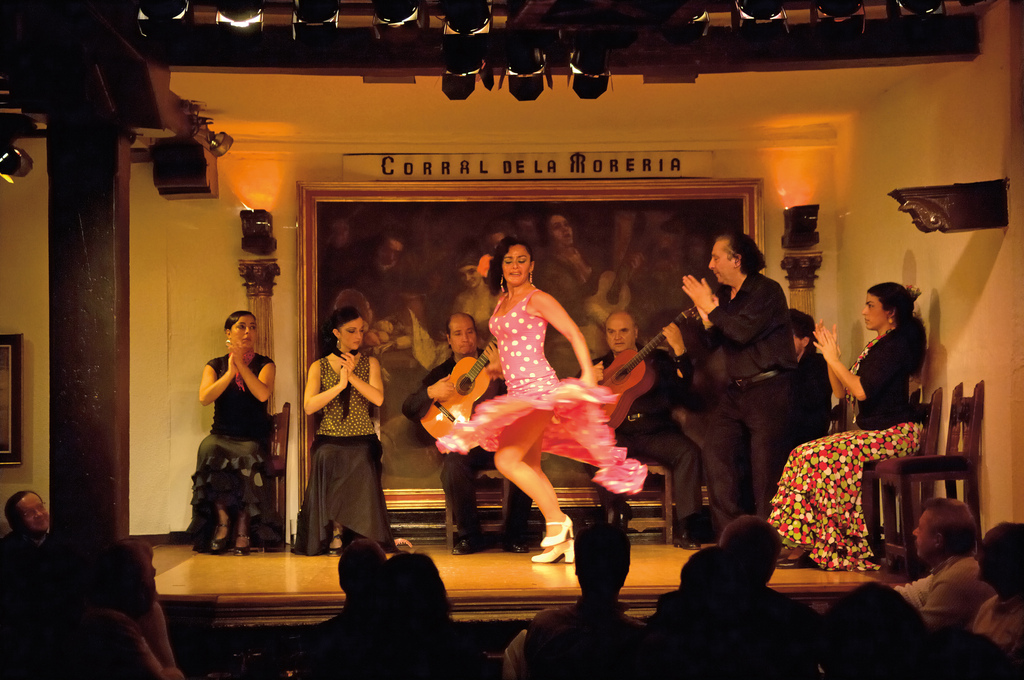 Corral de la Morería This photograph can be used for publications, including this copyright statement: “©PromoMadrid, author Max Alexander”. Esta fotografía puede usarse en publicaciones, incluyendo la declaración “©PromoMadrid, autor Max Alexander”.